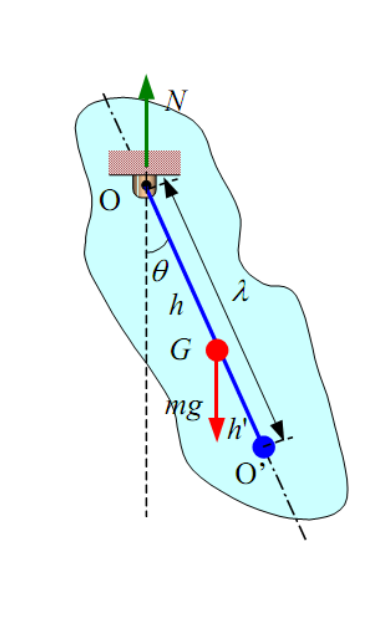 Donde h es la distancia entre el centro de masa y el centro de oscilación O. IO es el momento de inercia del cuerpo respecto del eje de rotación que pasa por O.